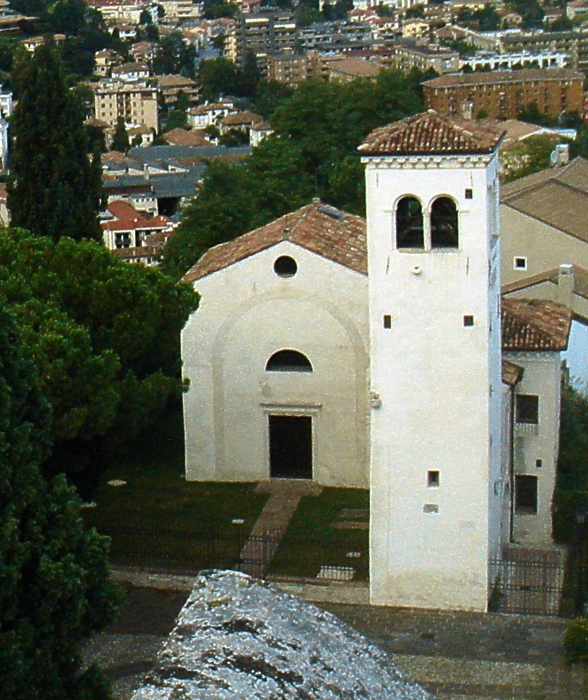 Conegliano: Chiesa di Sant'Orsola veduta dalla torre del Castello.